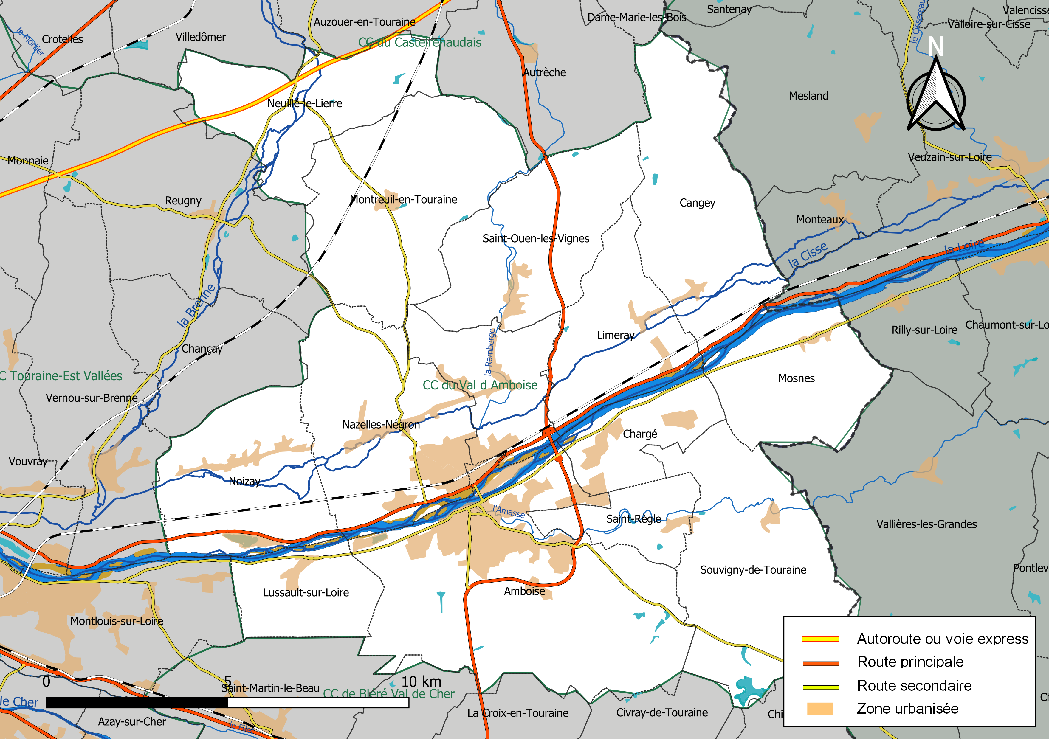 Carte de la communauté de communes du Val d'Amboise, département d'Indre-et-Loire, France. Composition au 1er janvier 2019.